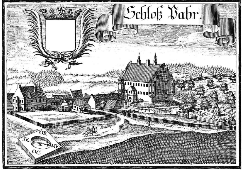 Schloss Unterbaar (Schloß Pahr), Kupferstich von Michael Wening um 1700